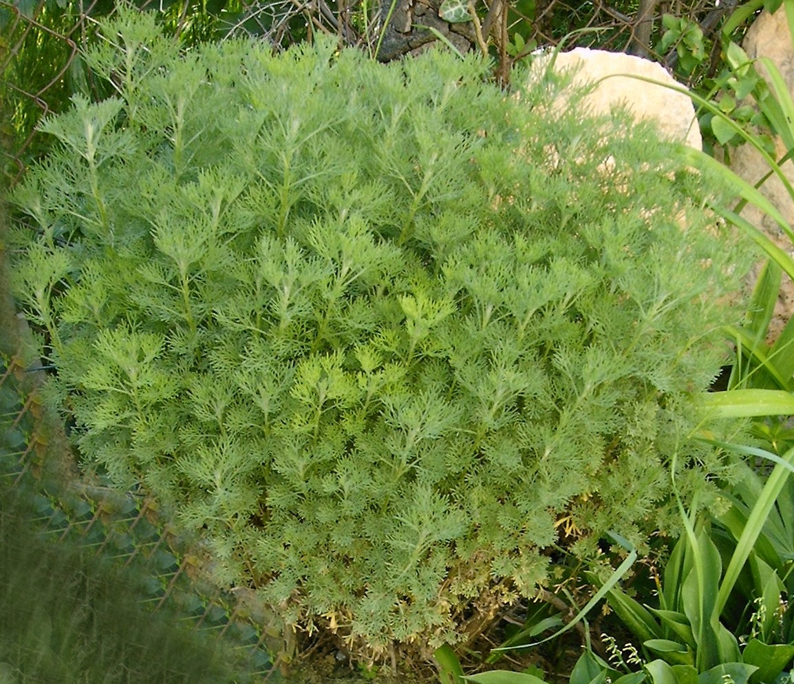 Il s'agit d'un plant d'arquebuse qui est dans mon jardin Artemisia abrotanum